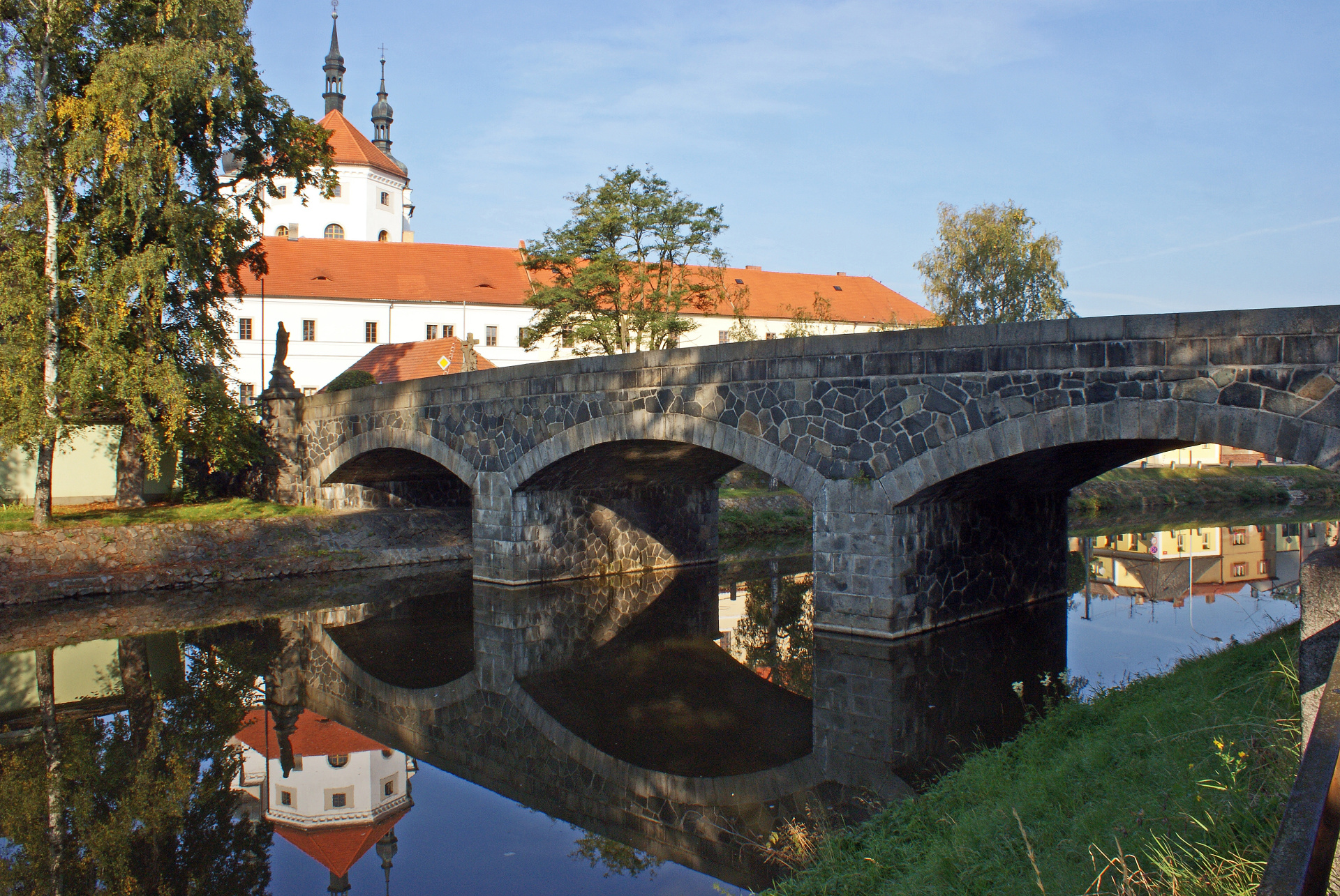 Silniční most se sochami, přes Vlčavu, dále ZSJ 142810?, 142900?, Březnice